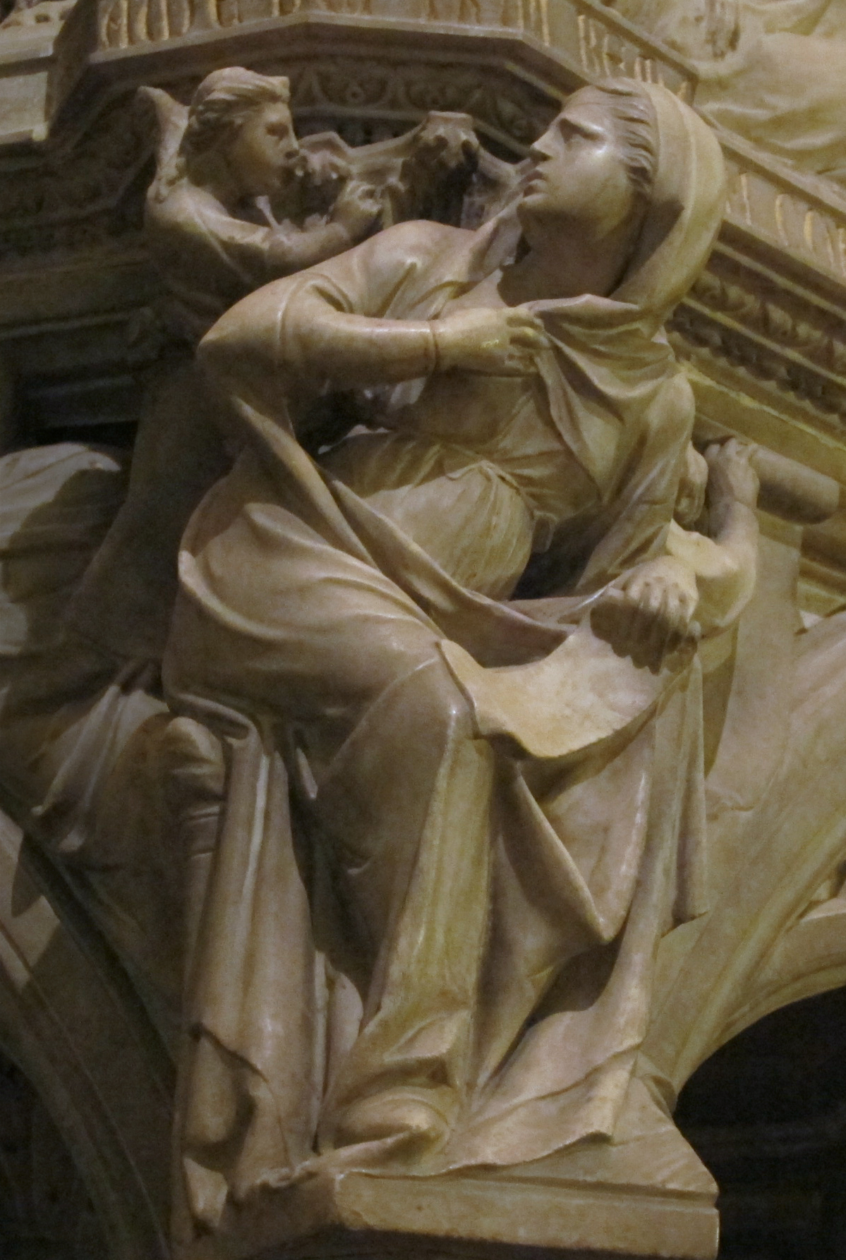 Giovanni pisano, pulpito di sant'andrea 10 crop